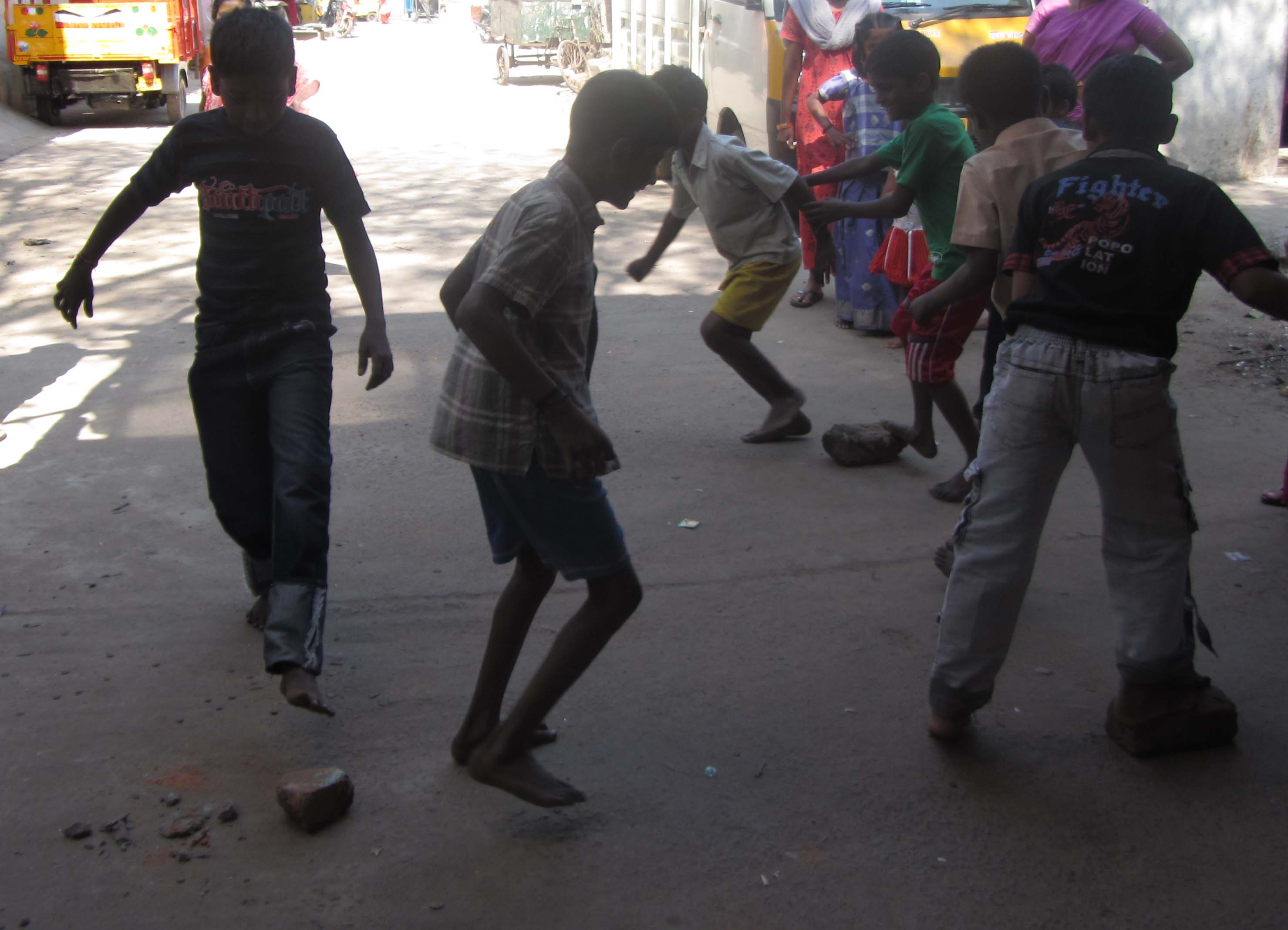 கல்லா மண்ணா விளையாட்டு. இங்குச் சிறுவர் ஆடுகின்றனர். சிறுமியரும், கலந்தும் இதனை விளையாடுவர். own shot